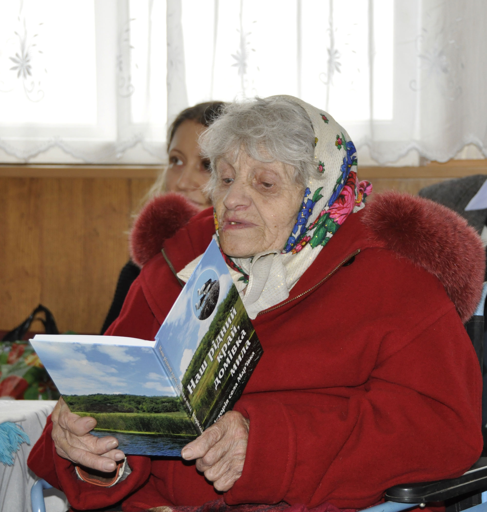 Село Марьевка. Презентация книги о Марьевке